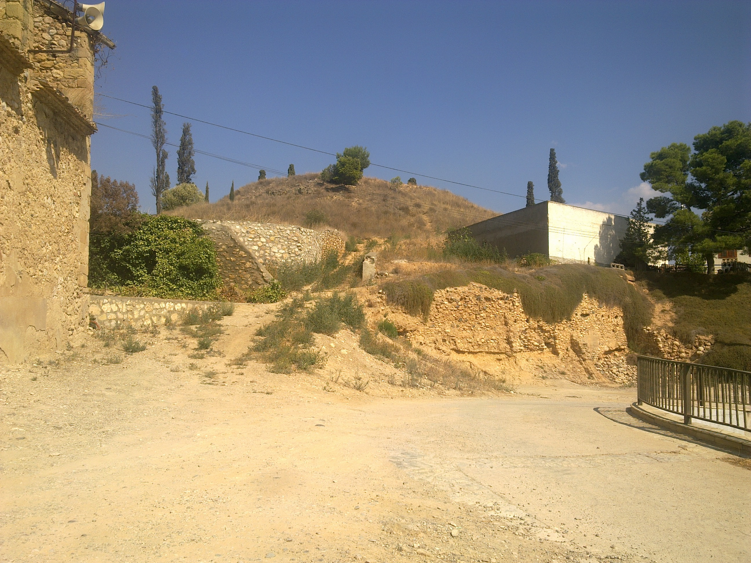 Castell de Garcia (Ribera d'Ebre)